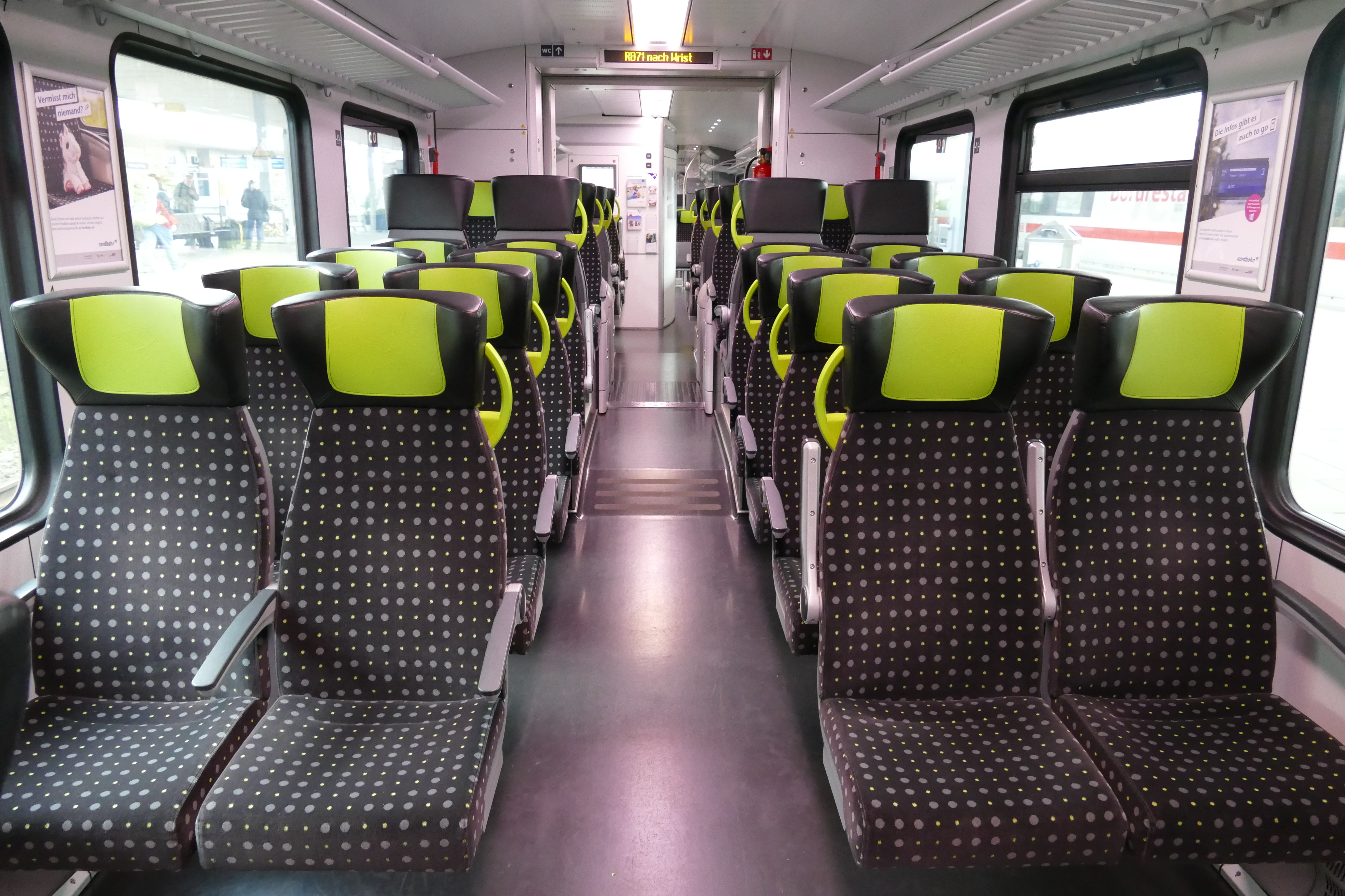 Blick in den Innenraum eines Nordbahn-Elektrotriebwagen